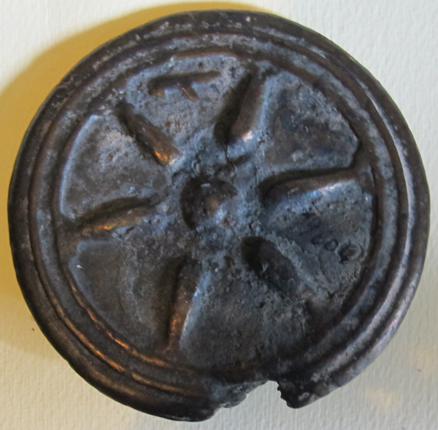 Museo Archeologico Nazionale G.C.Mecenate - MIBAC This is a photo of a monument which is part of cultural heritage of Italy.